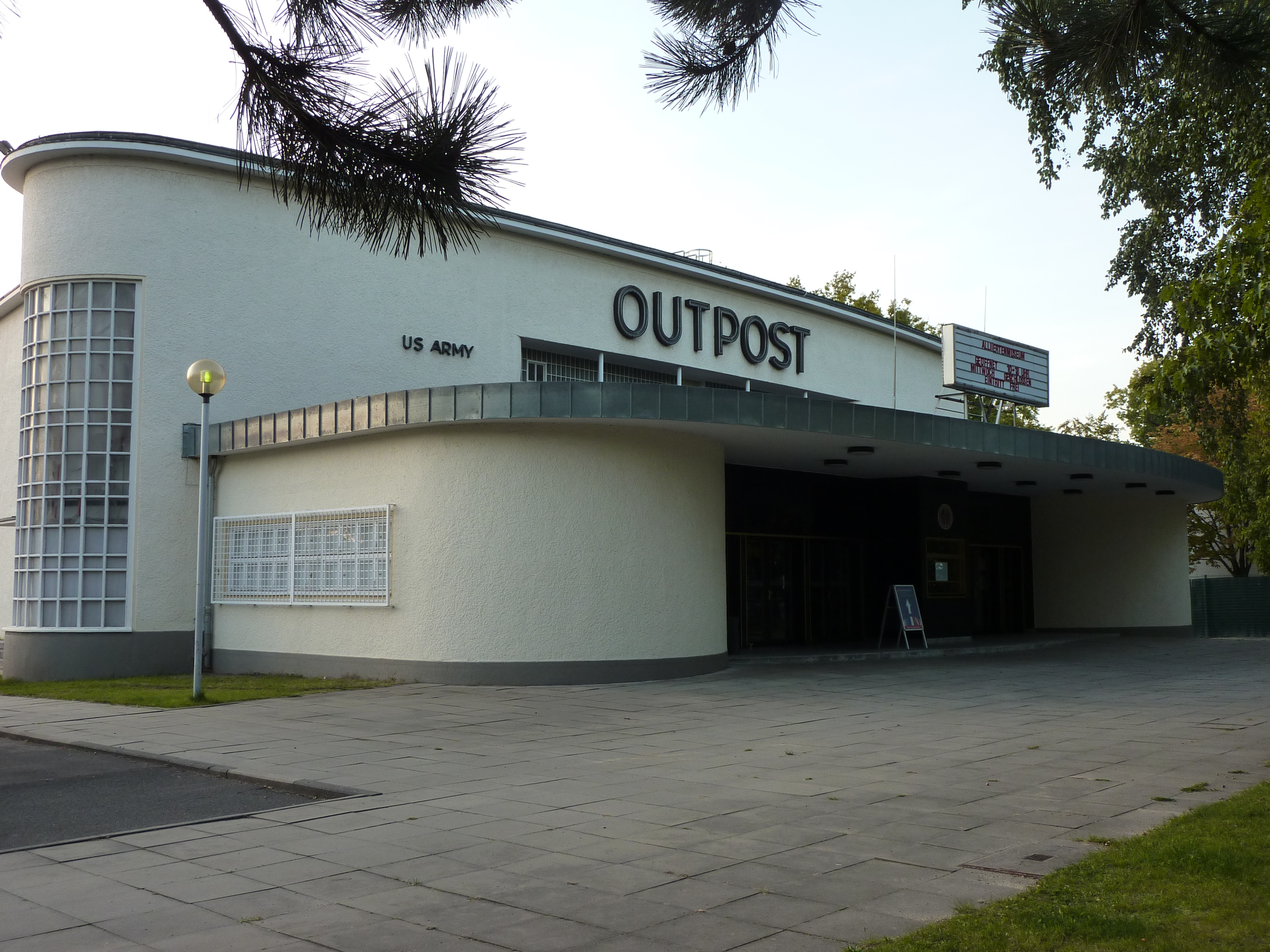 Gebäude Monument Alliierte Museum